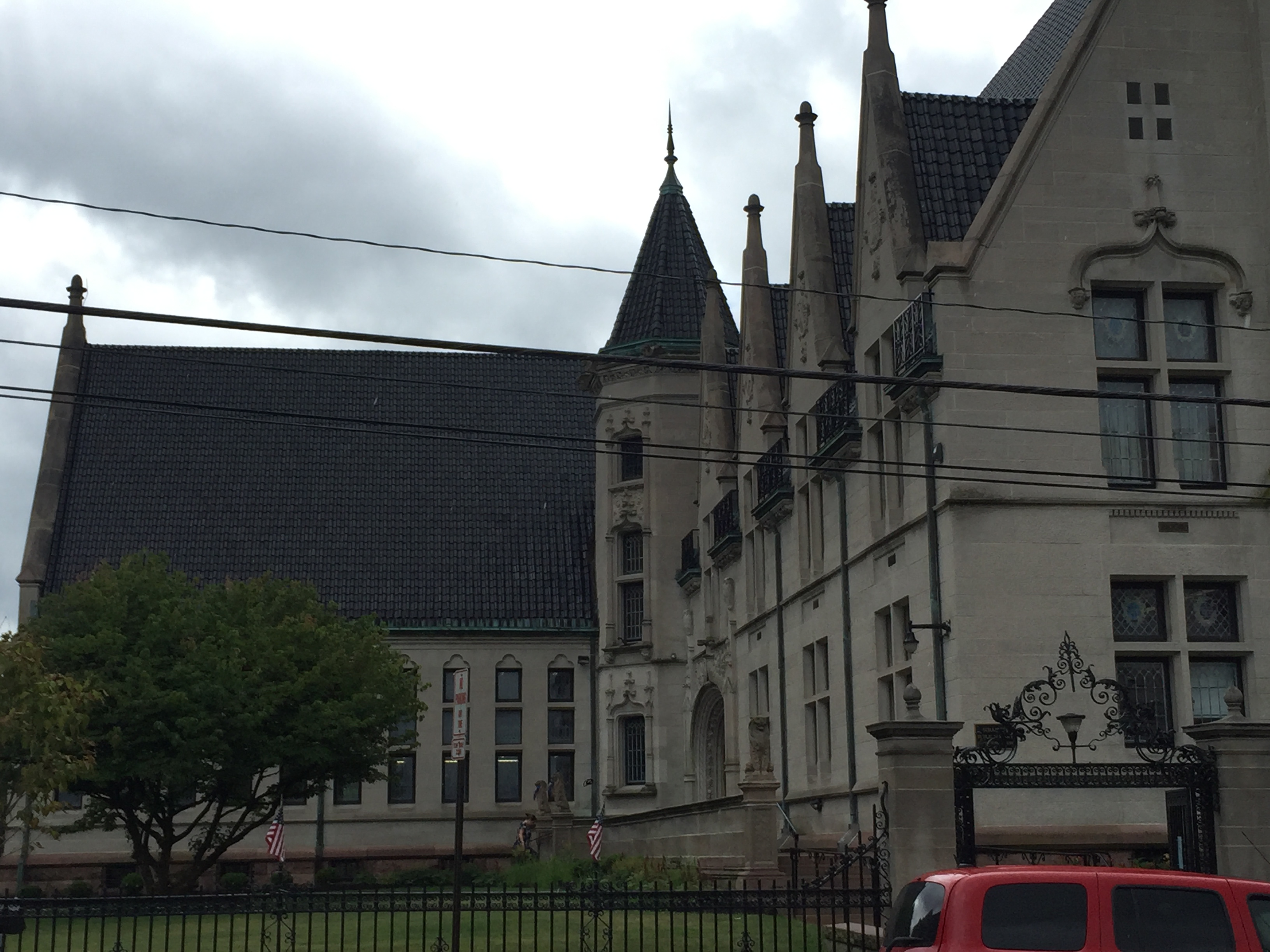 Bibliotheca Publica Scrantonis in anno 1893 aedificata est. Haec pictura in anno 2018 sumpta est.